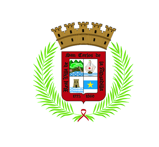 Escudo de Aguadilla, Puerto Rico